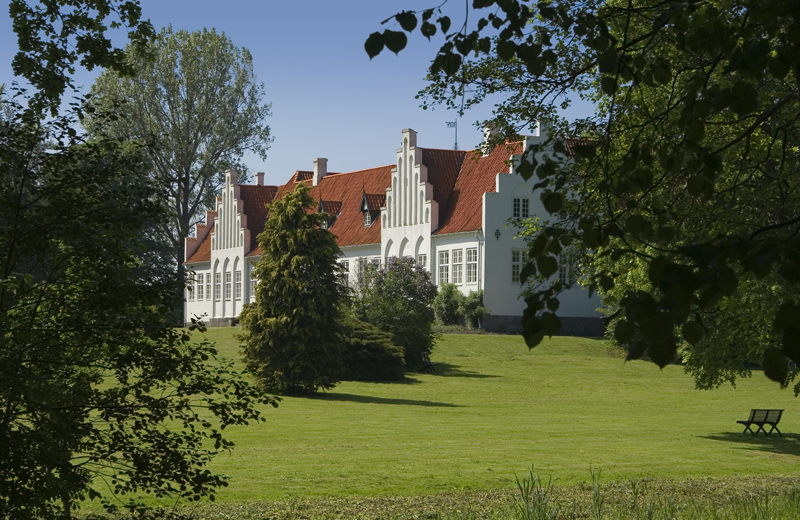 Rønnebæksholm ved Næstved.